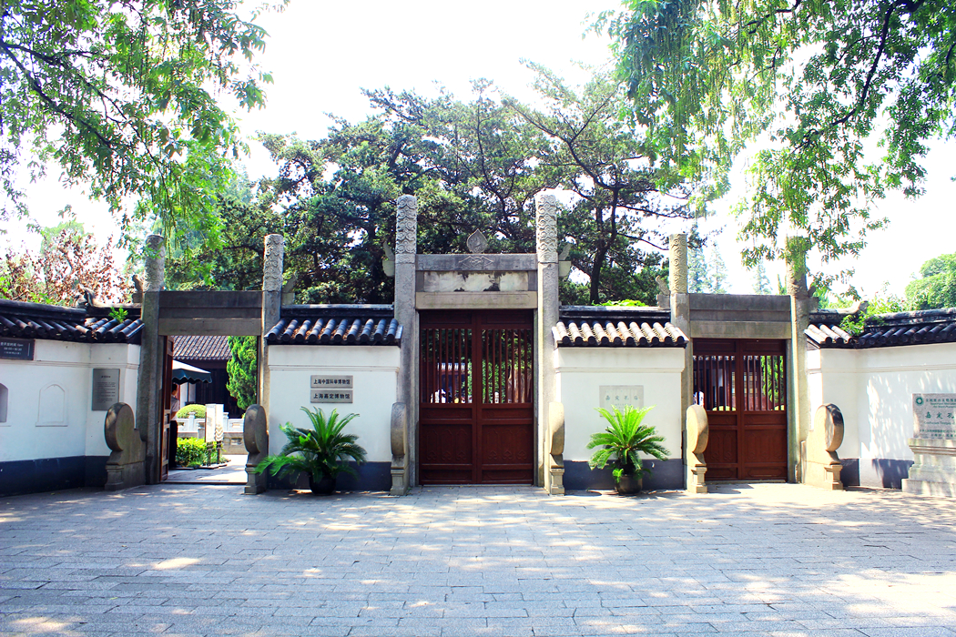 中文（中国大陆）: 直隸蘇州府嘉定縣孔廟